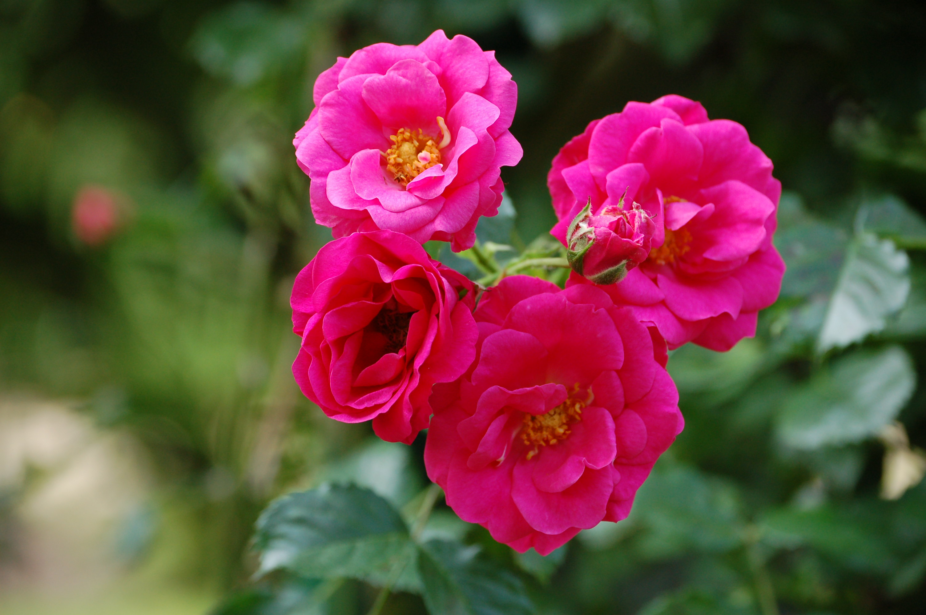 Rosa 'Ritter von Barmstede'